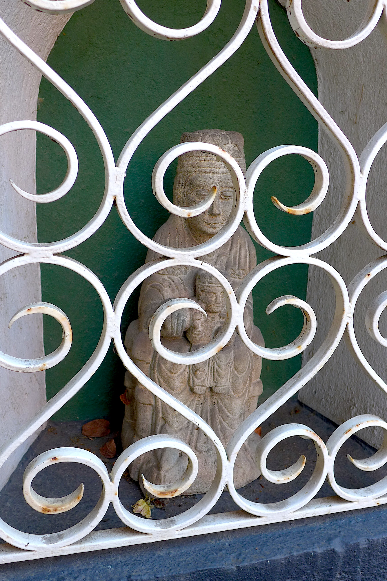 Ниша в фасаде дома с Богородицей и младенцем Иисусом. Дюссельдорф, Кайзерсверт, улица Am Mühlenturm, дом 8. Памятник архитектуры.